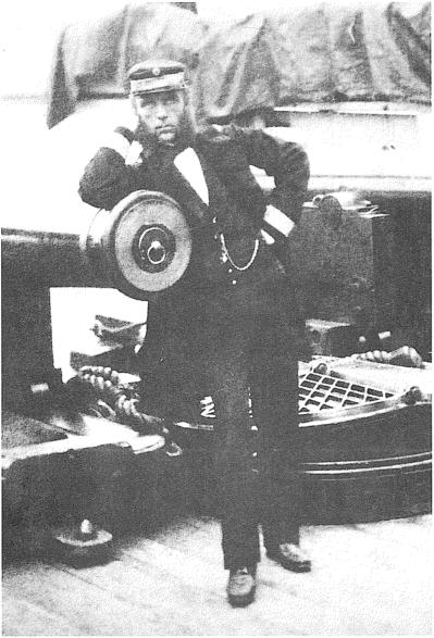 Konteradmiral Wilhelm von Tegetthoff auf seinem Flaggschiff "Schwarzenberg" nach dem Seegefecht vor Helgoland am 9. Mai 1864. Photo vom preußischen Hofphotographen C. Jounod.